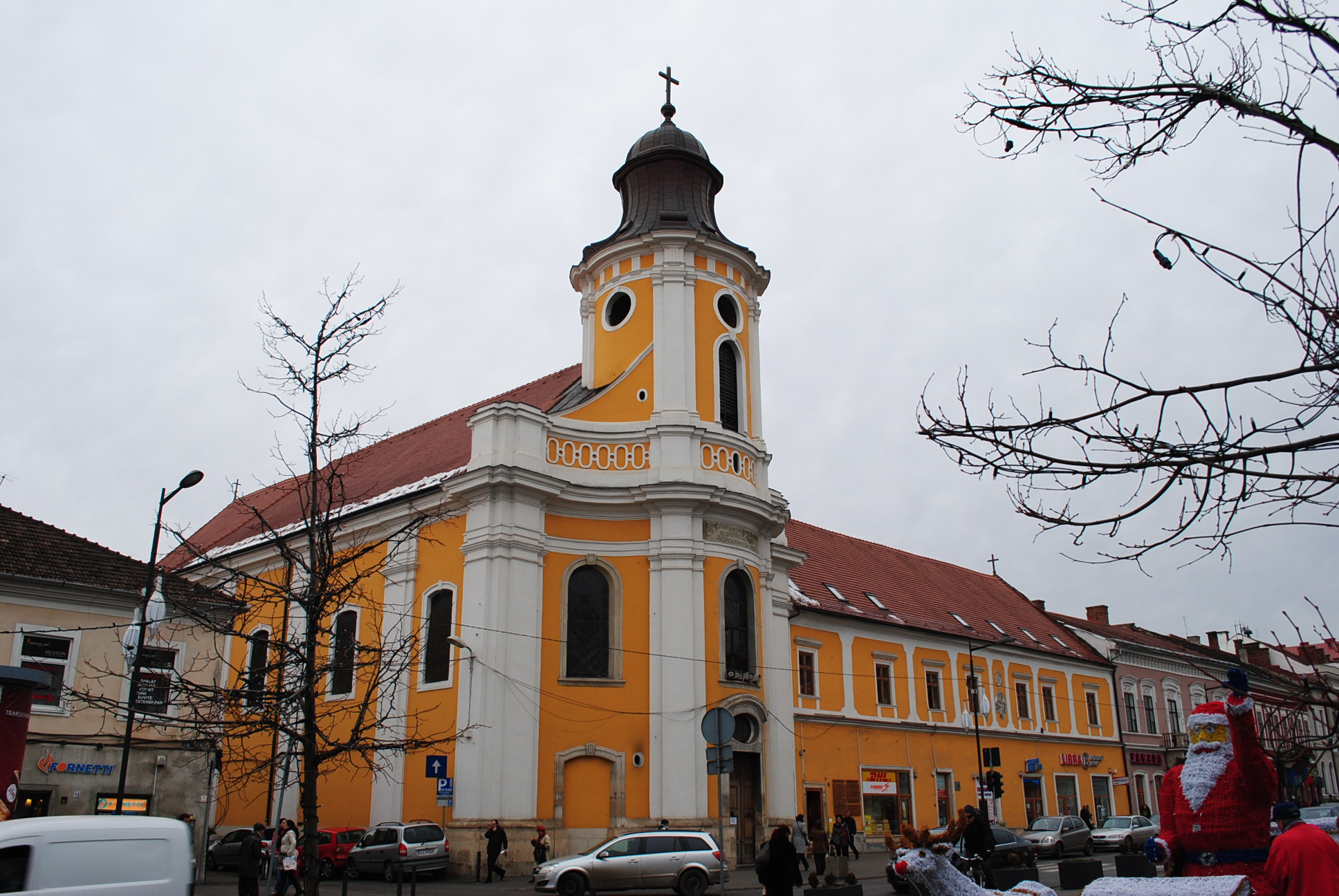 Mănăstirea minoriților, sec. XVI - XIX